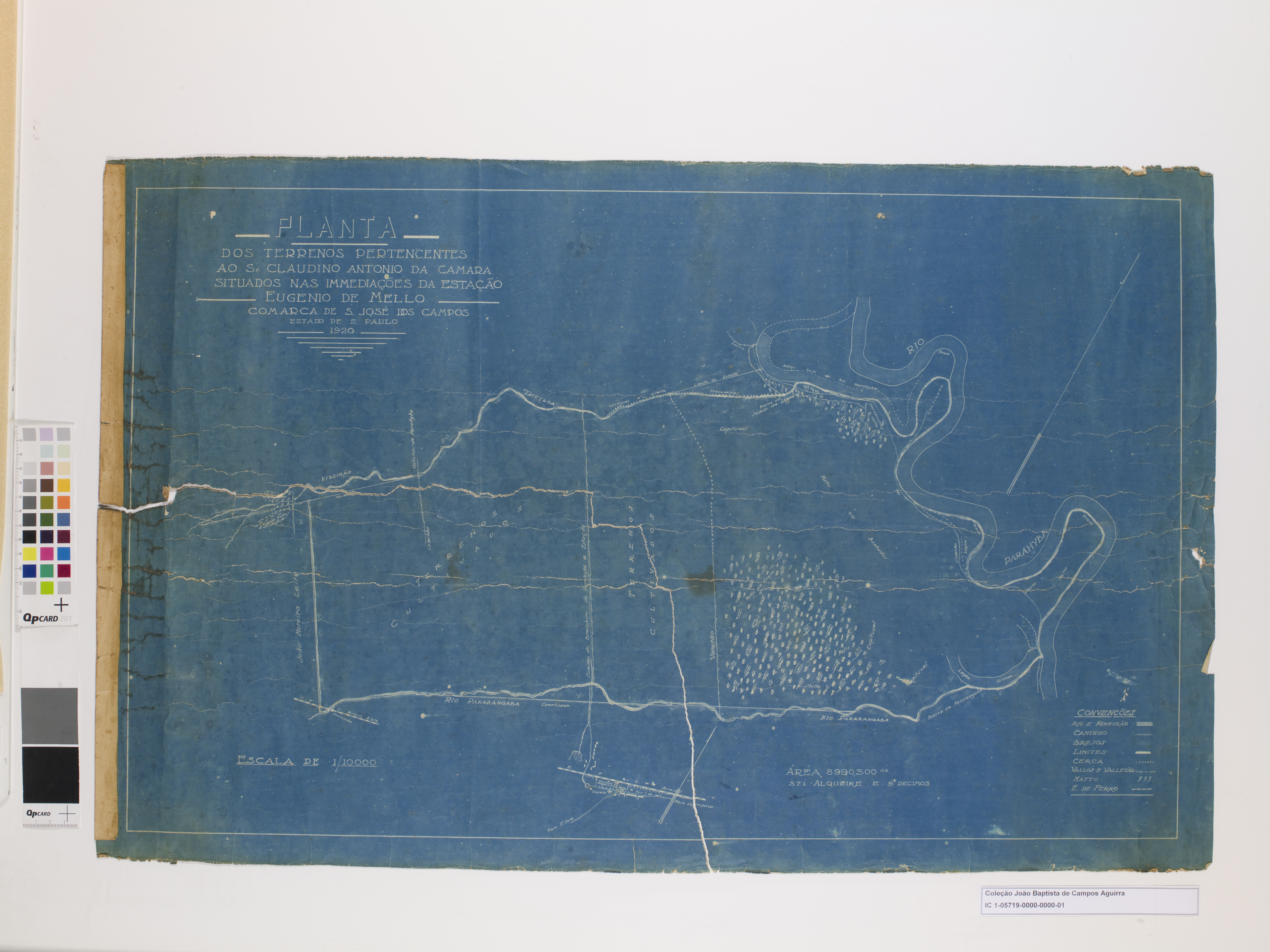 Obra que integra o acervo do Museu Paulista da USP. Coleção João Baptista de Campos Aguirra